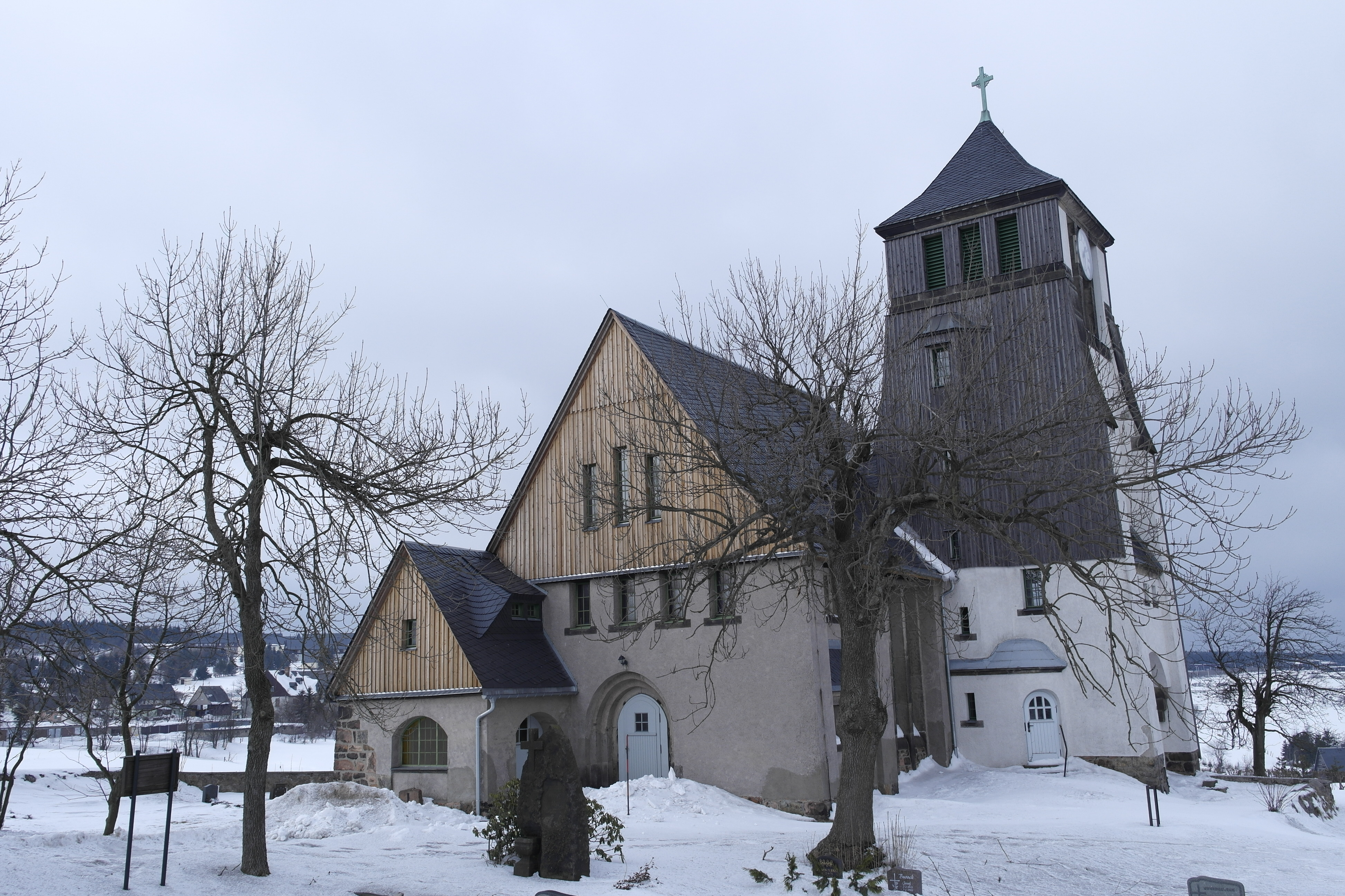 Die Evangelisch- Lutherische Kirche zu Zinnwald-Georgenfeld wurde 1908/1909 nach Plänen der Dresdner Architekten Lossow und Kühne errichtet